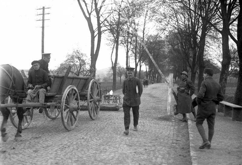 Zur Befreiung des besetzten Gebietes am 30. Juni 1930! Ein interessanter Rückblick aus der schweren Zeit im besetzten Gebiet. Marokkanische Posten an der Grenze des besetzten Gebietes bei Limburg an der Lahn im April 1923. Ausgewiesene deutsche Beamte beim Überschreiten der Grenze.